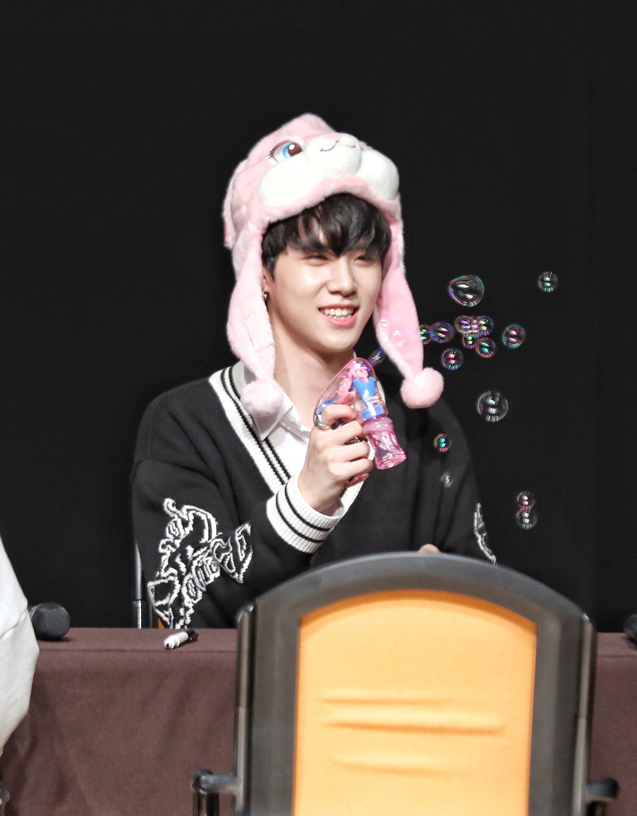 171022 JBJ 압구정 팬싸 동한4